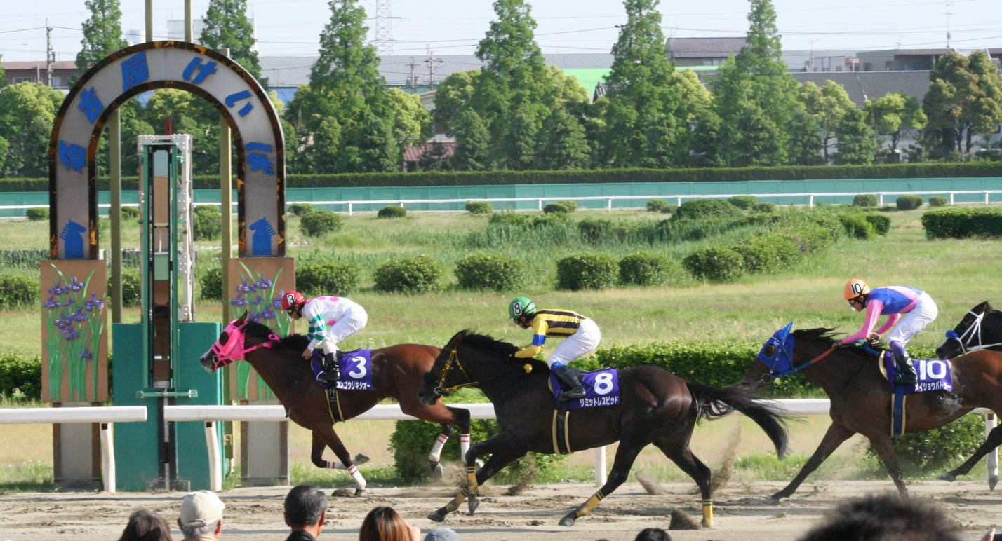 かきつばた記念（2008年5月6日 名古屋競馬場）